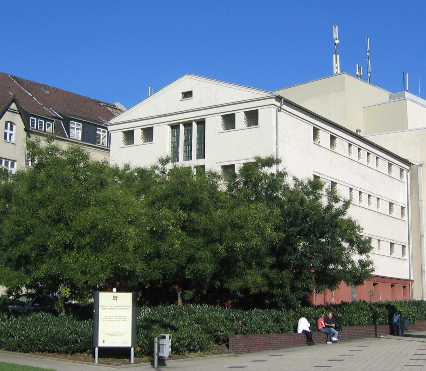 Mahn- und Gedenkstaätte Steinwache Eigene Aufnahme September 2006